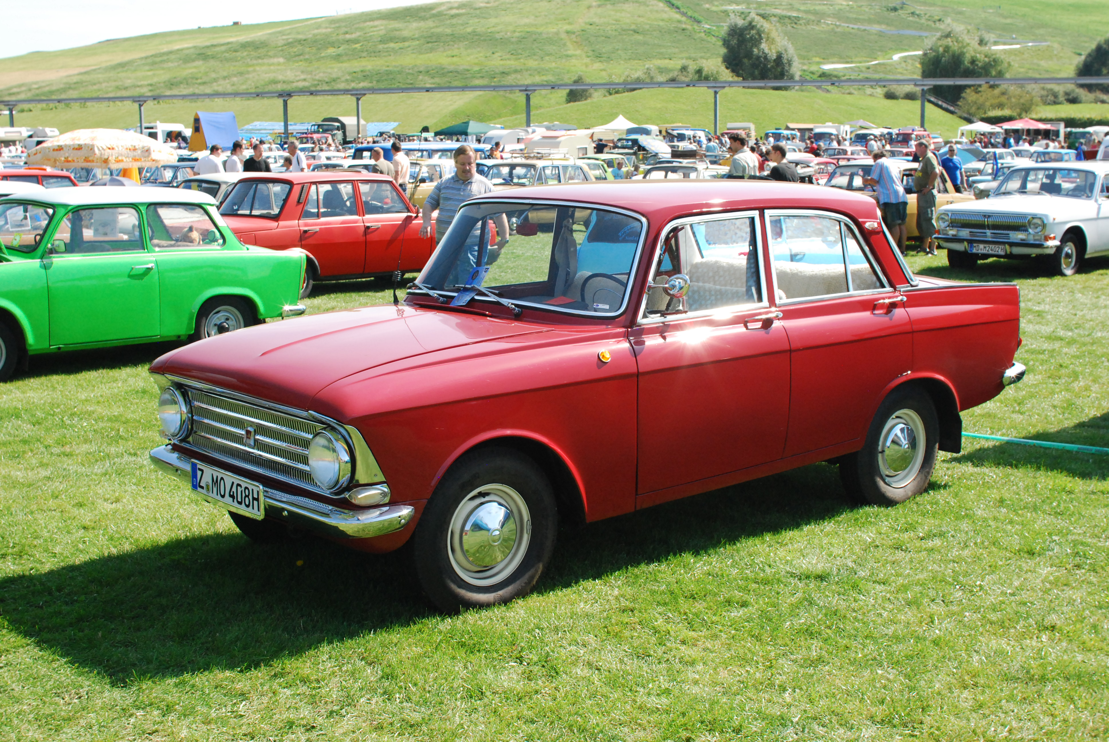 Moskvitch 408 Fotos von der OMMMA 2011 am 03.09.2011 im Magdeburger Elbauenpark